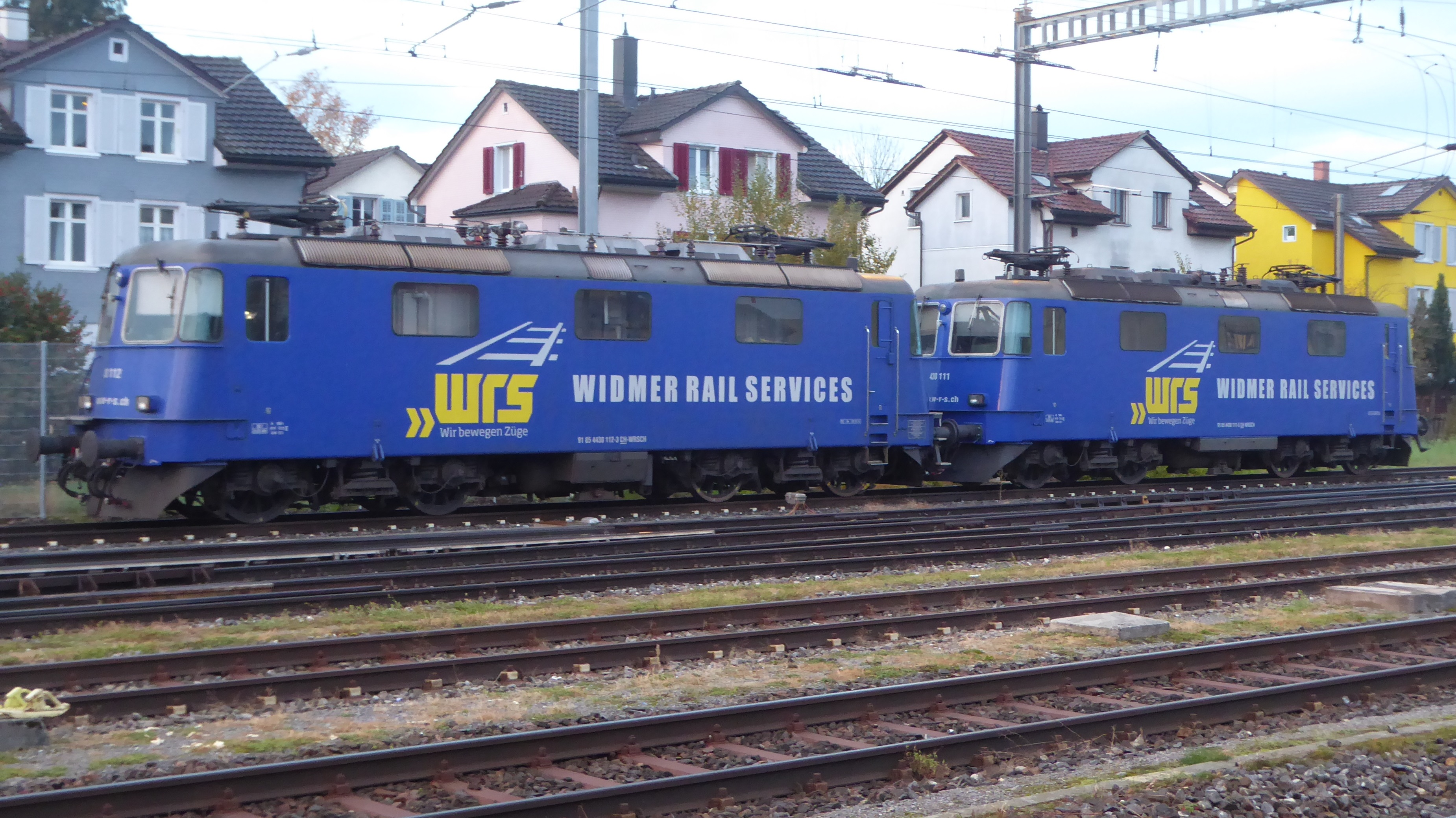 Re 430 112-3 und Re 430 111-5 im Bahnhof Wil SG